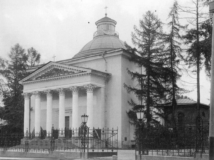 Костел в Царском Селе. Фото нач. 20 в